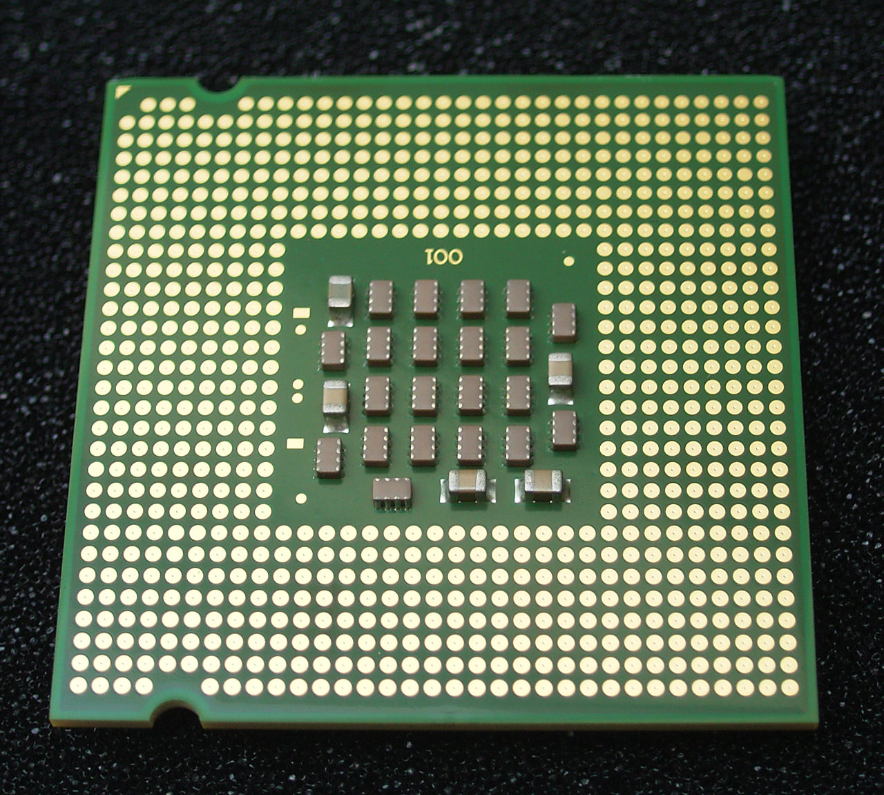 Bildbeschreibung: Kontaktflächen eines Prozessors in LGA-Technik Quelle: Eigenes Foto Fotograf/Zeichner: Smial Datum: 17.05.2006